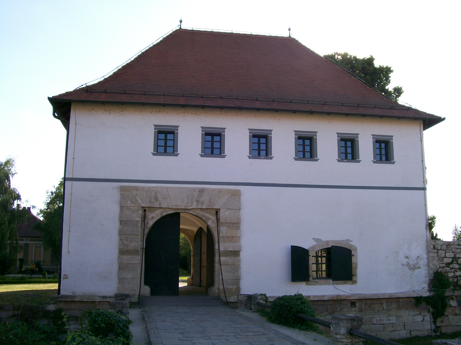 Ulazna kula Varaždin Stari grad